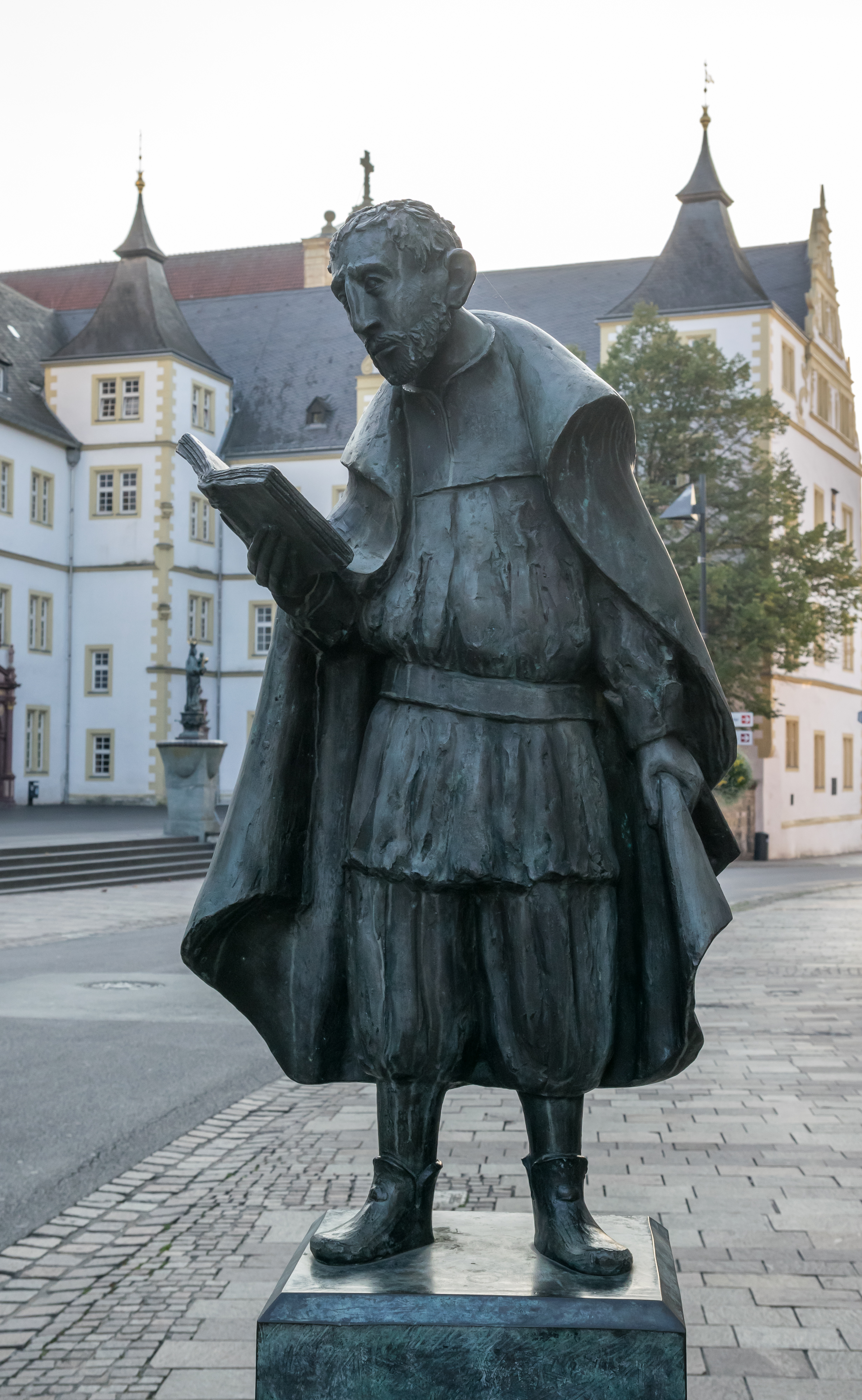 Denkmal für Friedrich Spee in Paderborn